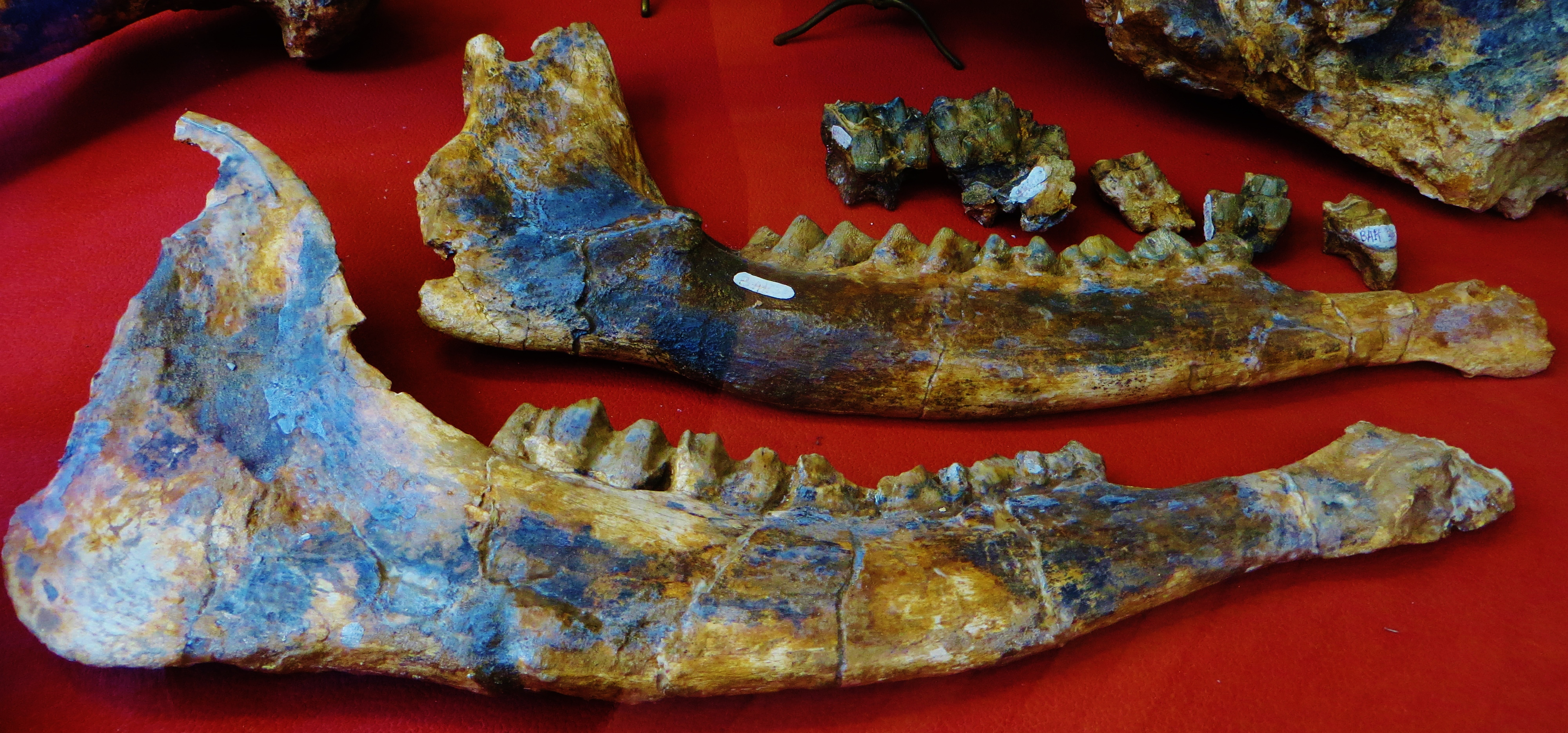 Fossil of Alephis, an extinct mammal - Took the photo at Museum Histoire Naturelle, Paris